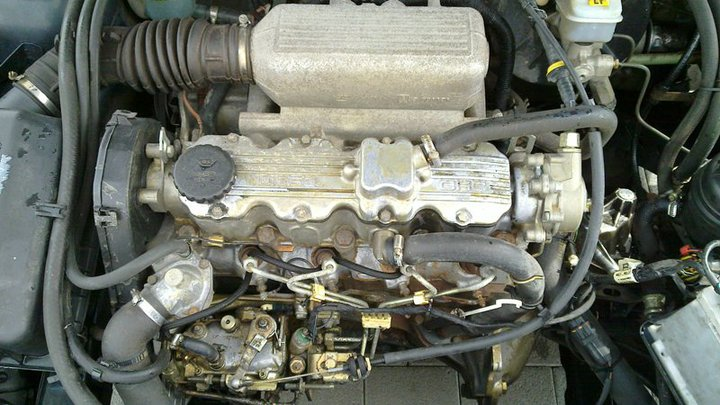 Opel Dieselmotor "17D" mit 42kw/57PS